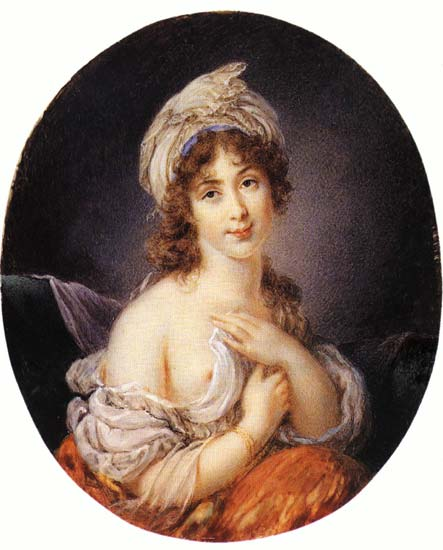 А.-Х.Ритт. Портрет Е.А.Демидовой. Между 1800–1805. Холст, масло. ГЭ